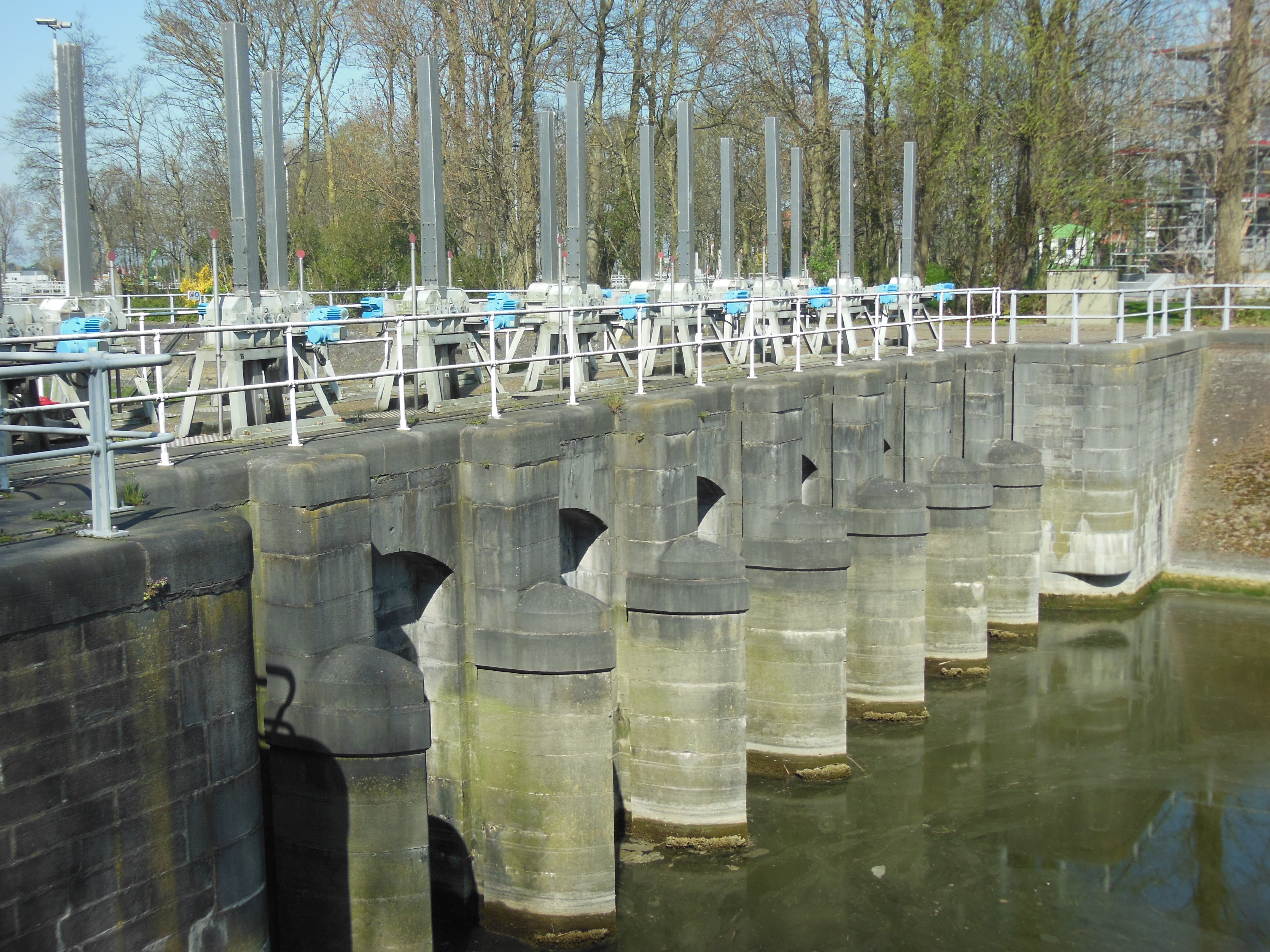 Acht dubbel uitgevoerde portieken van de Veurne Ambacht overlaat met zestien tandwielkasten om de schotten te bedienen